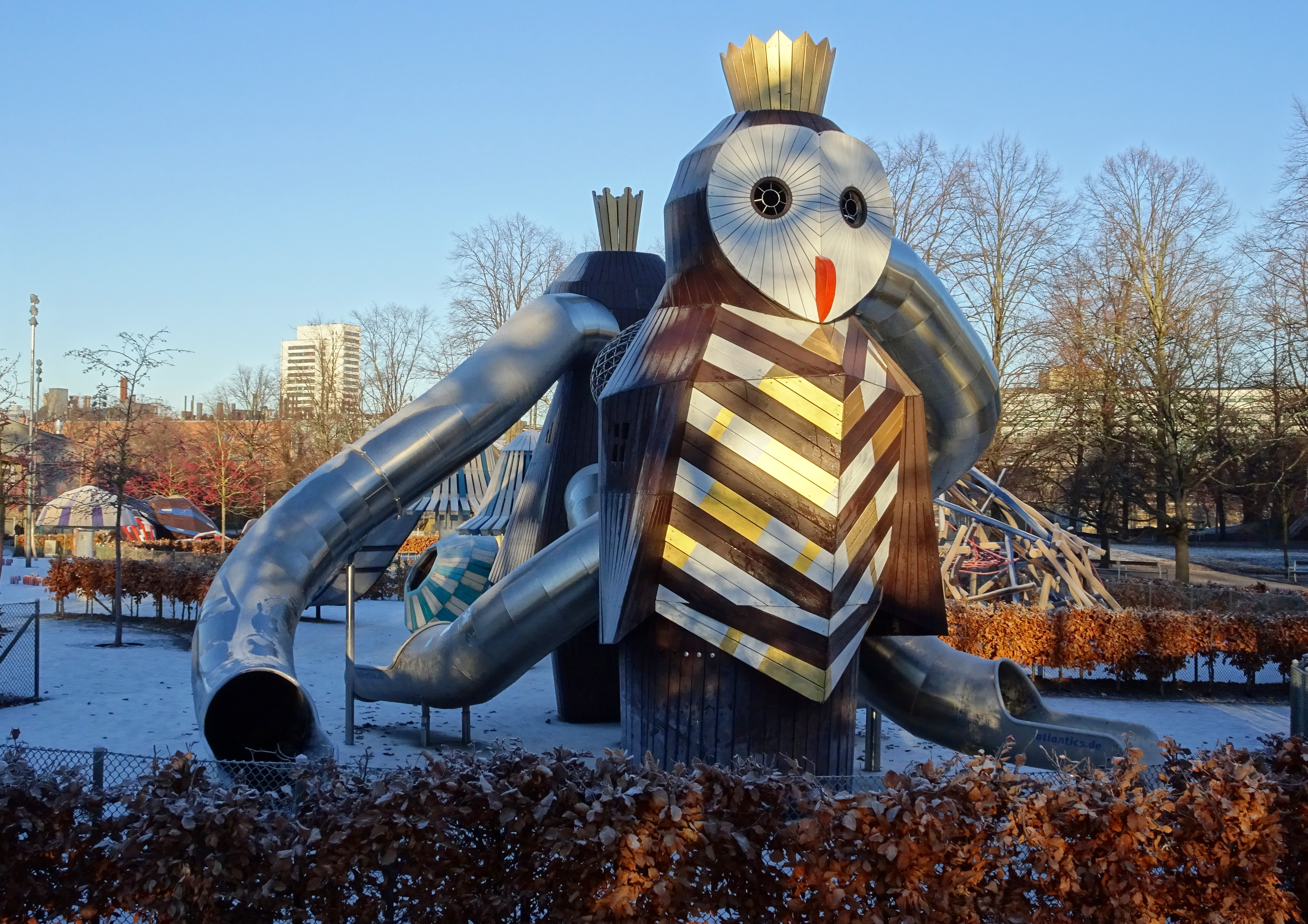 Ugglan i Uggleparken, Kristinebergs slottspark